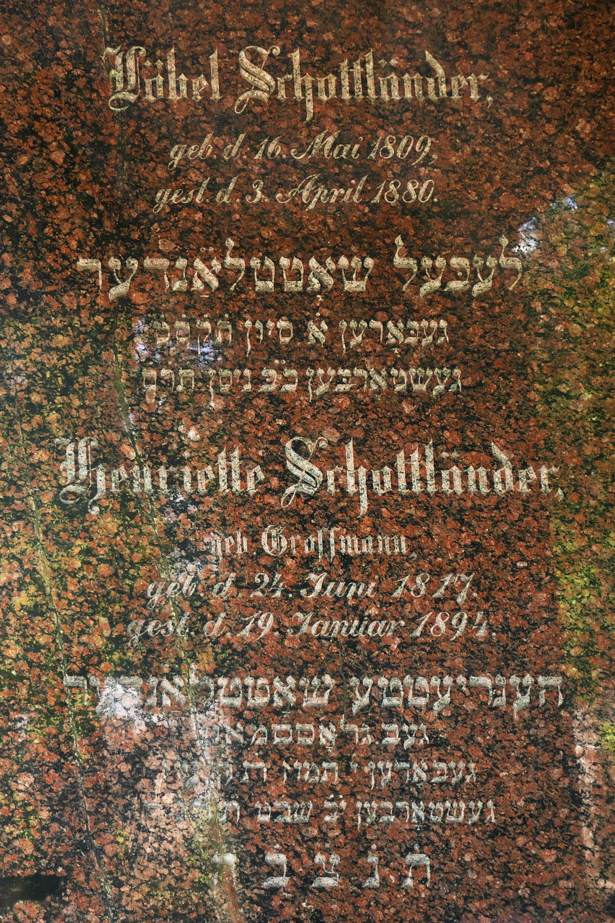 Grabplatte von Löbel und Henriette Schottländer auf dem Alten Jüdischen Friedhof in Breslau, Polen.